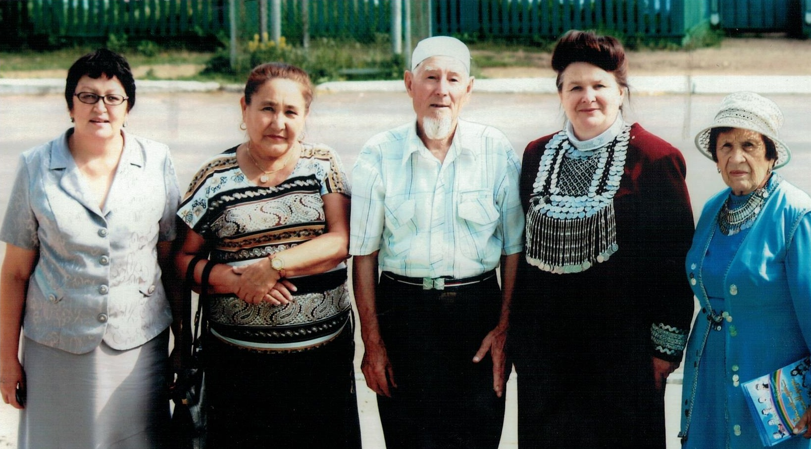 Башҡорт ҡатын-ҡыҙҙар йәмғиәте ағзалары Әбйәлилдә. 2011